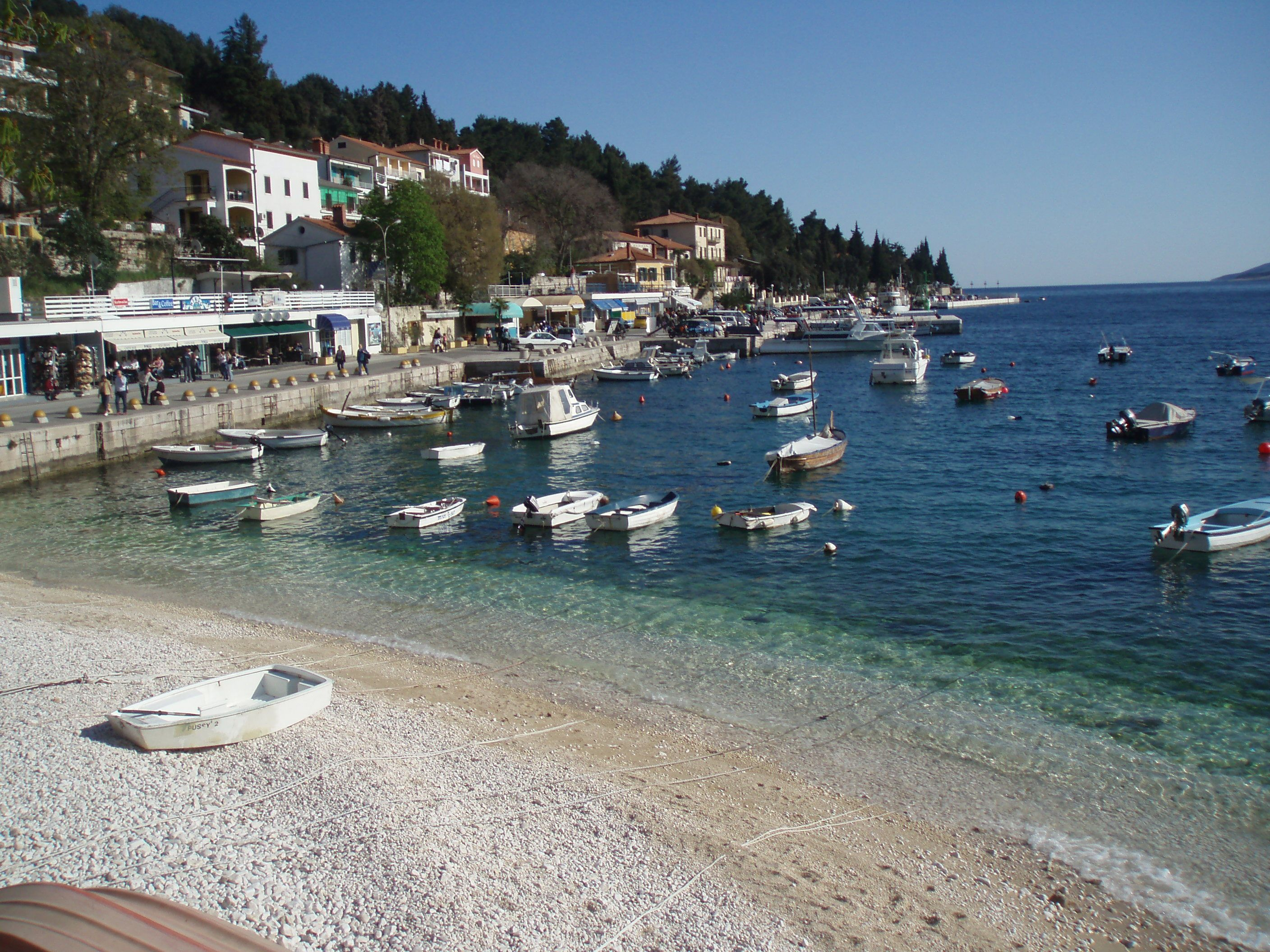 Rabac, Istra, Croatia